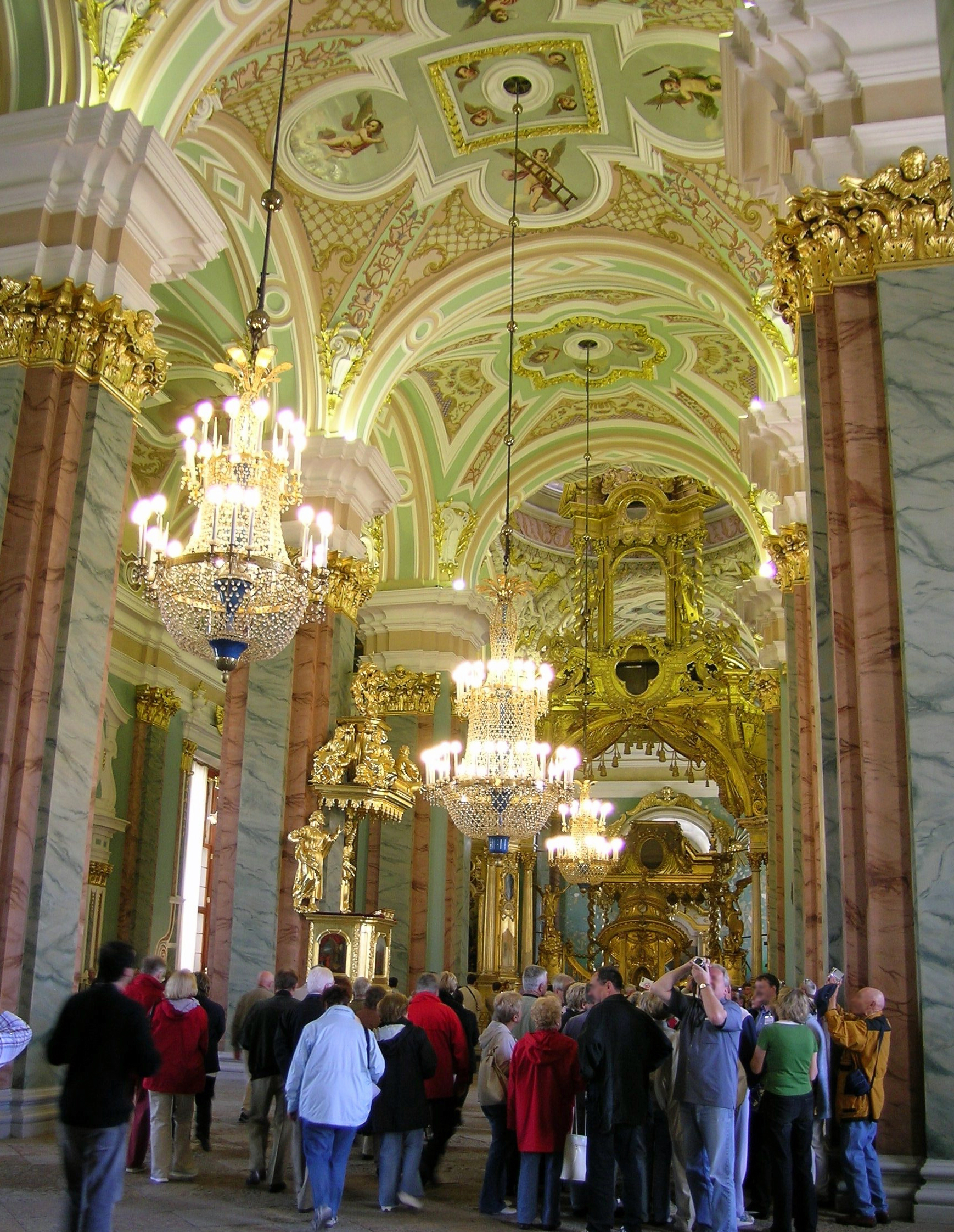 Im Innern der Peter- und Paul-Kathedrale, St. Petersburg)